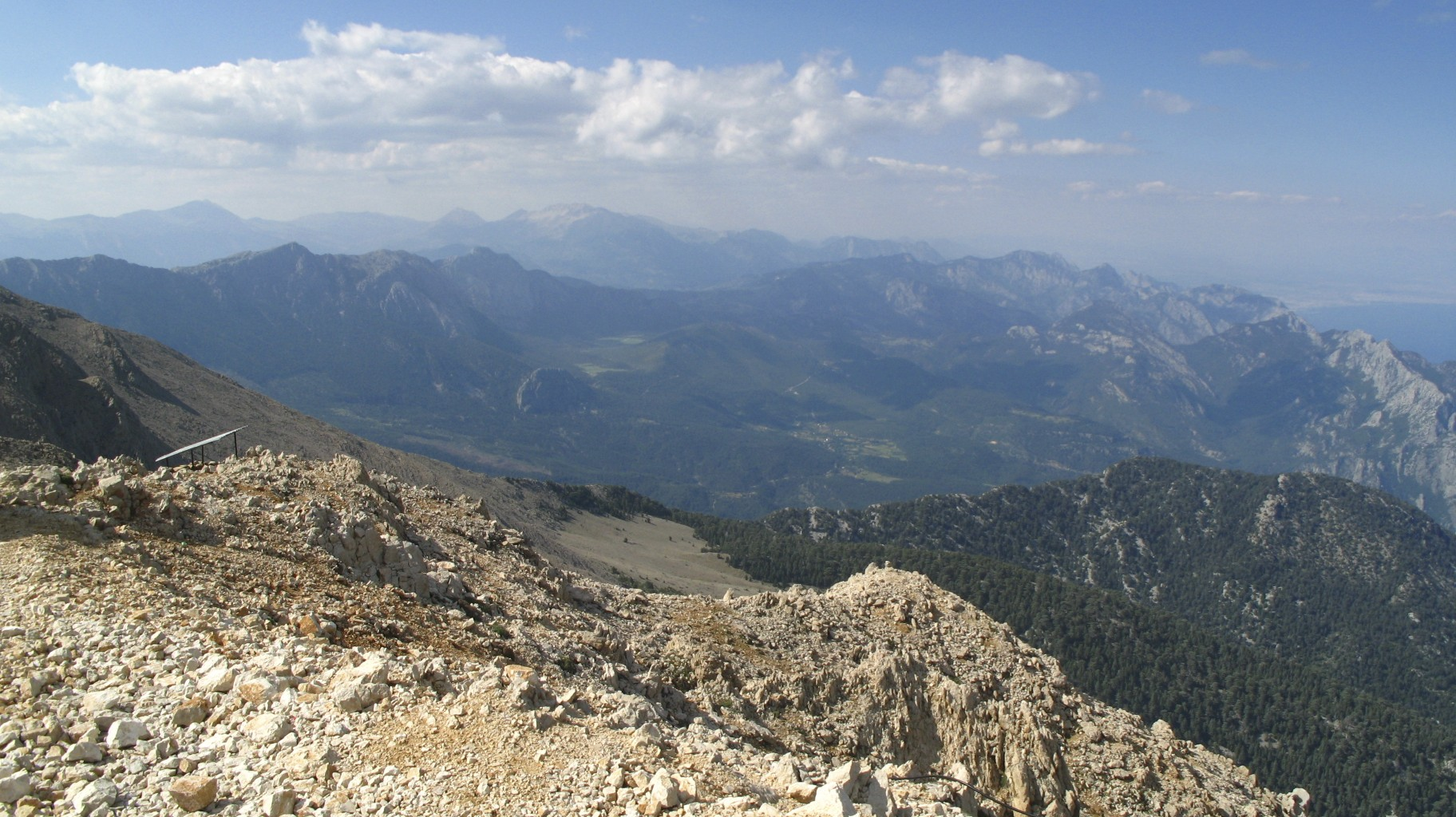 Tahtali Mountains